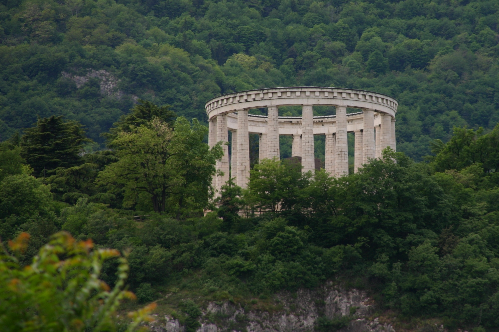 Mausoleo di Cesare Battisti This is a photo of a monument which is part of cultural heritage of Italy.